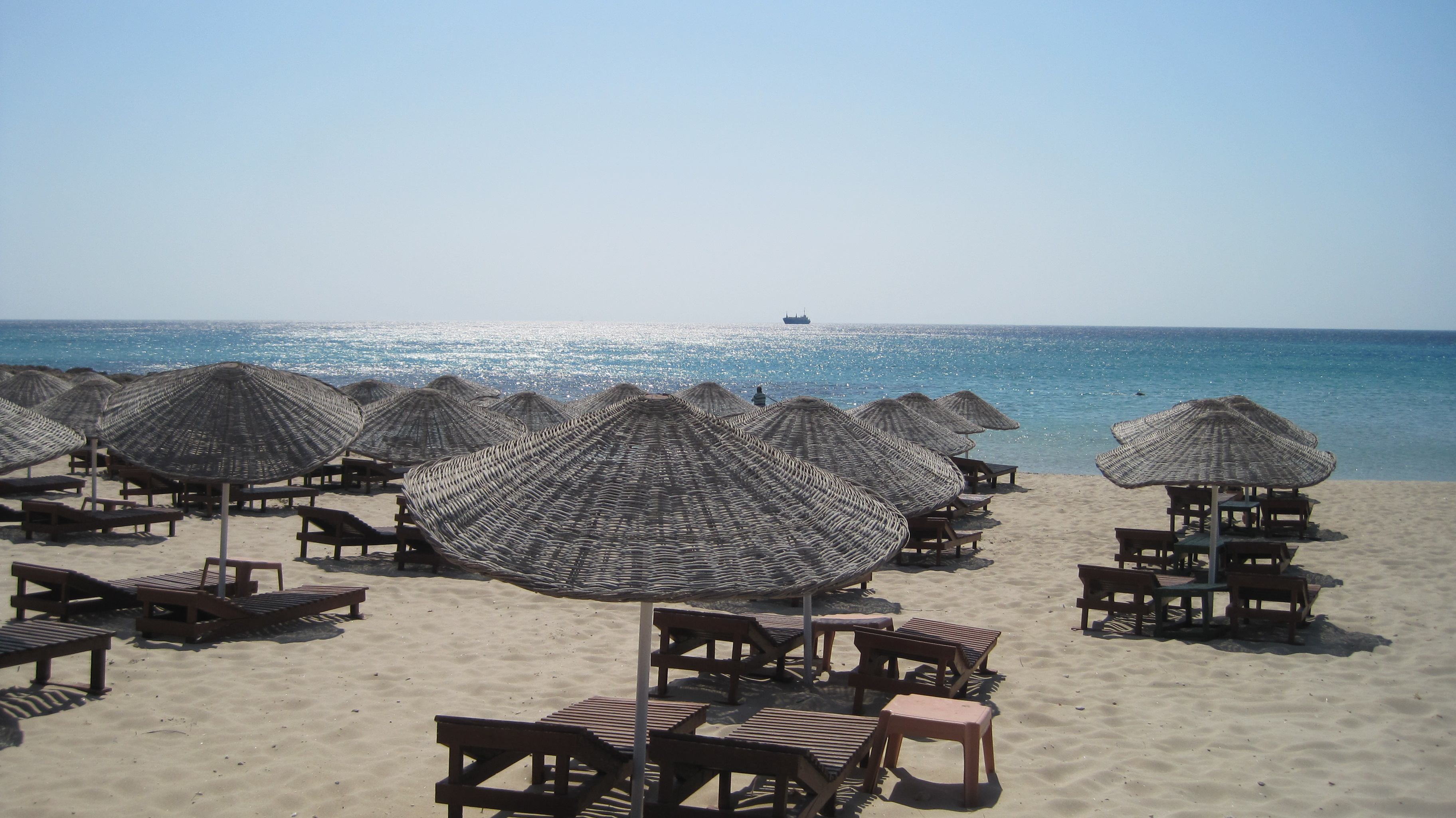 Altınkum, 35930 Çeşme/İzmir, Turkey